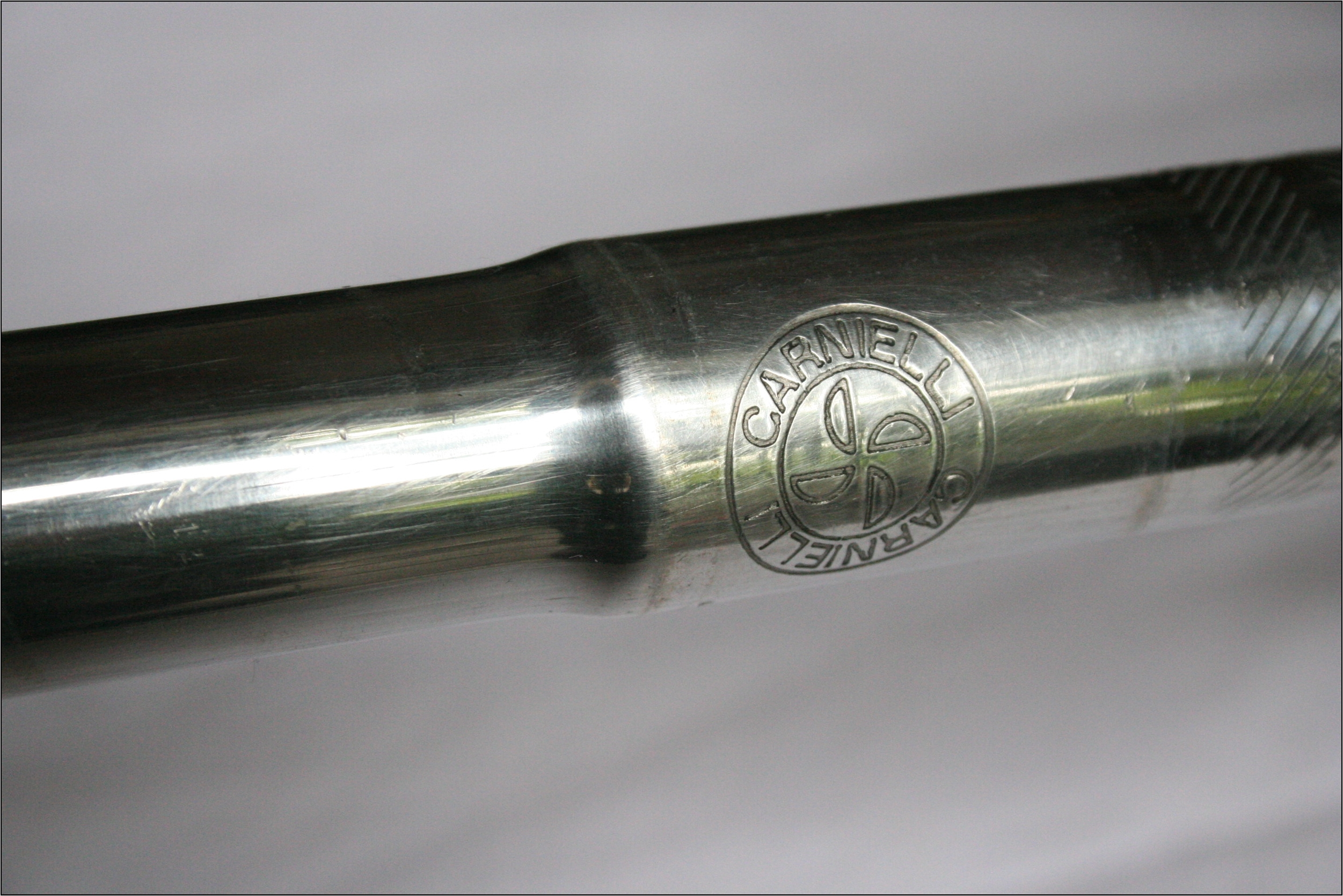 Carnielli Rennrad Lenker